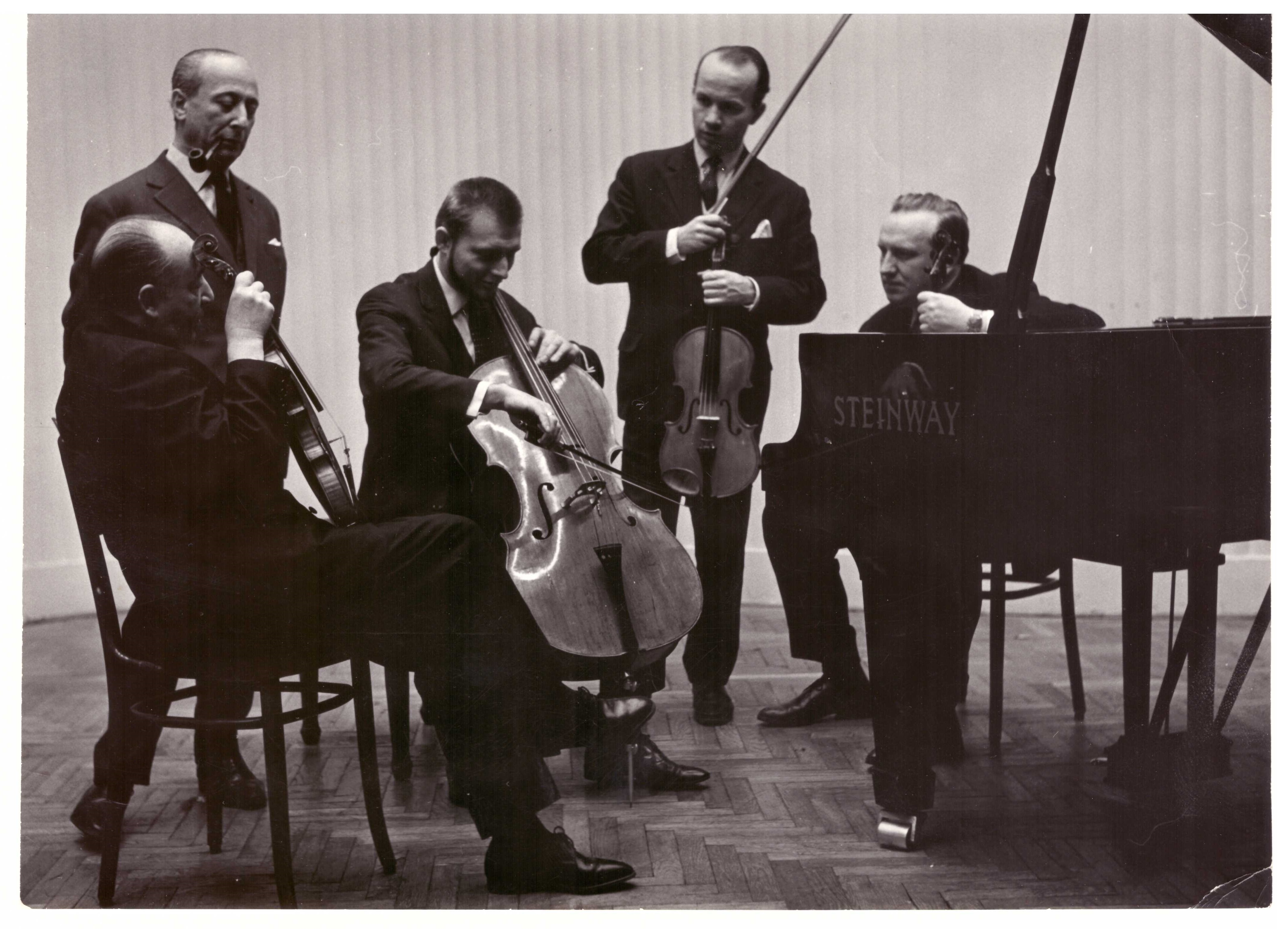 Kwintet Warszawski. Stoją od lewej: Władysław Szpilman, Stefan Kamasa siedzą od lewej: Bronisław Gimpel, Aleksander Ciechański, Tadeusz Wroński